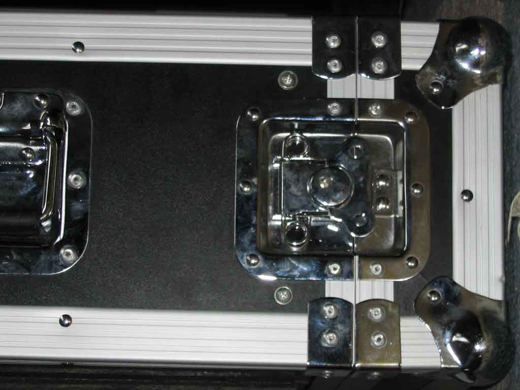 Butterflyverschluss, geschlossen. Wackernheim, den 25.08.2005